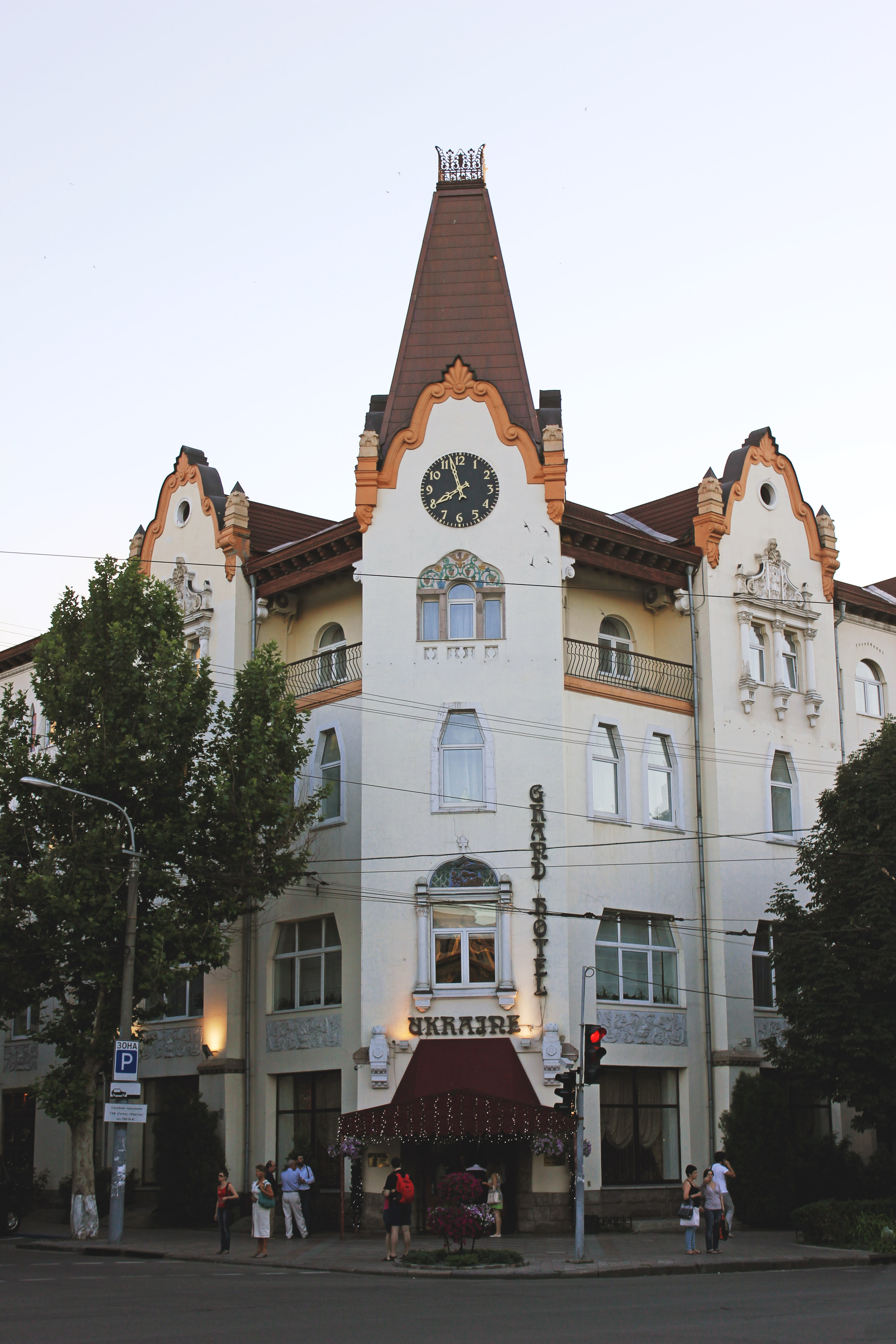 Будинок готелю «Україна», Дніпропетровськ, вул. Короленка, 2